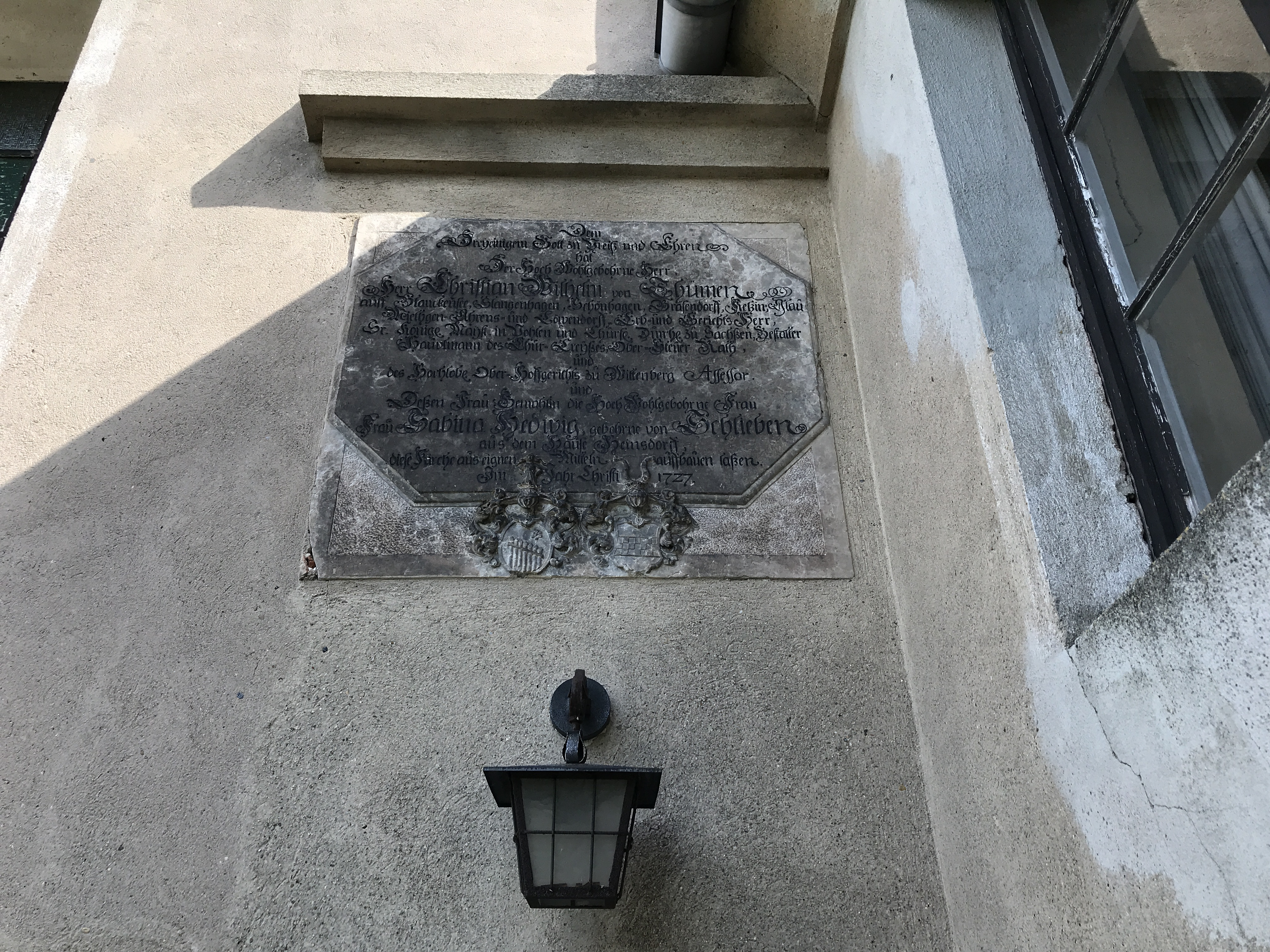 Die Dorfkirche Stangenhagen in Stangenhagen der Stadt Trebbin im Landkreis Teltow-Fläming ist eine Saalkirche aus dem Jahr 1727. Im Innern steht unter anderem ein Kanzelaltar, der vermutlich aus der Bauzeit stammt.